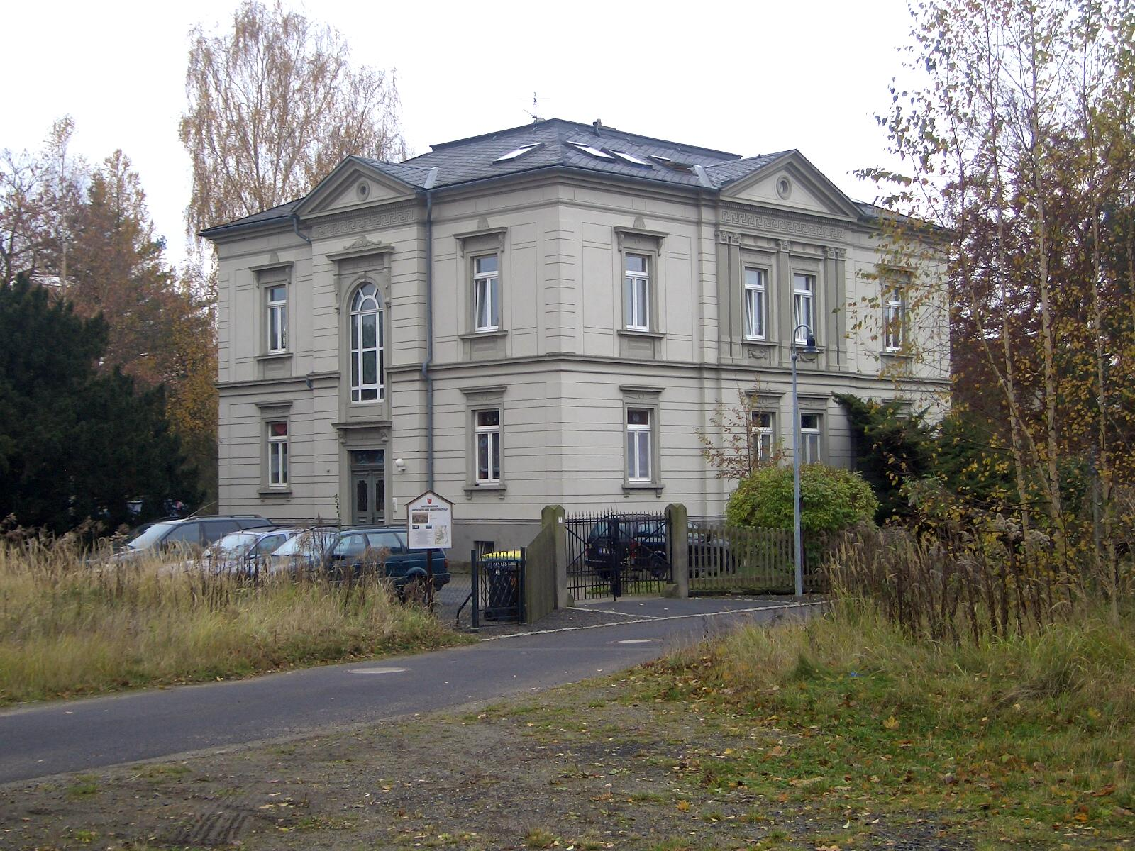 Foto von der Villa des früheren Fabrikbesitzers Johann Benjamin Herrmann, heute ein Mehrfamilien-Wohnhaus.